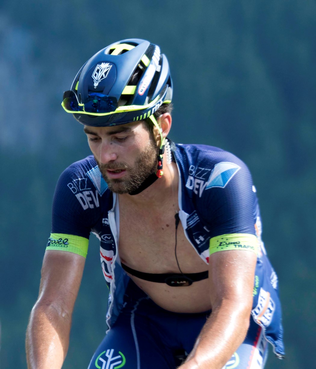 20-7_11 van keirsbulck